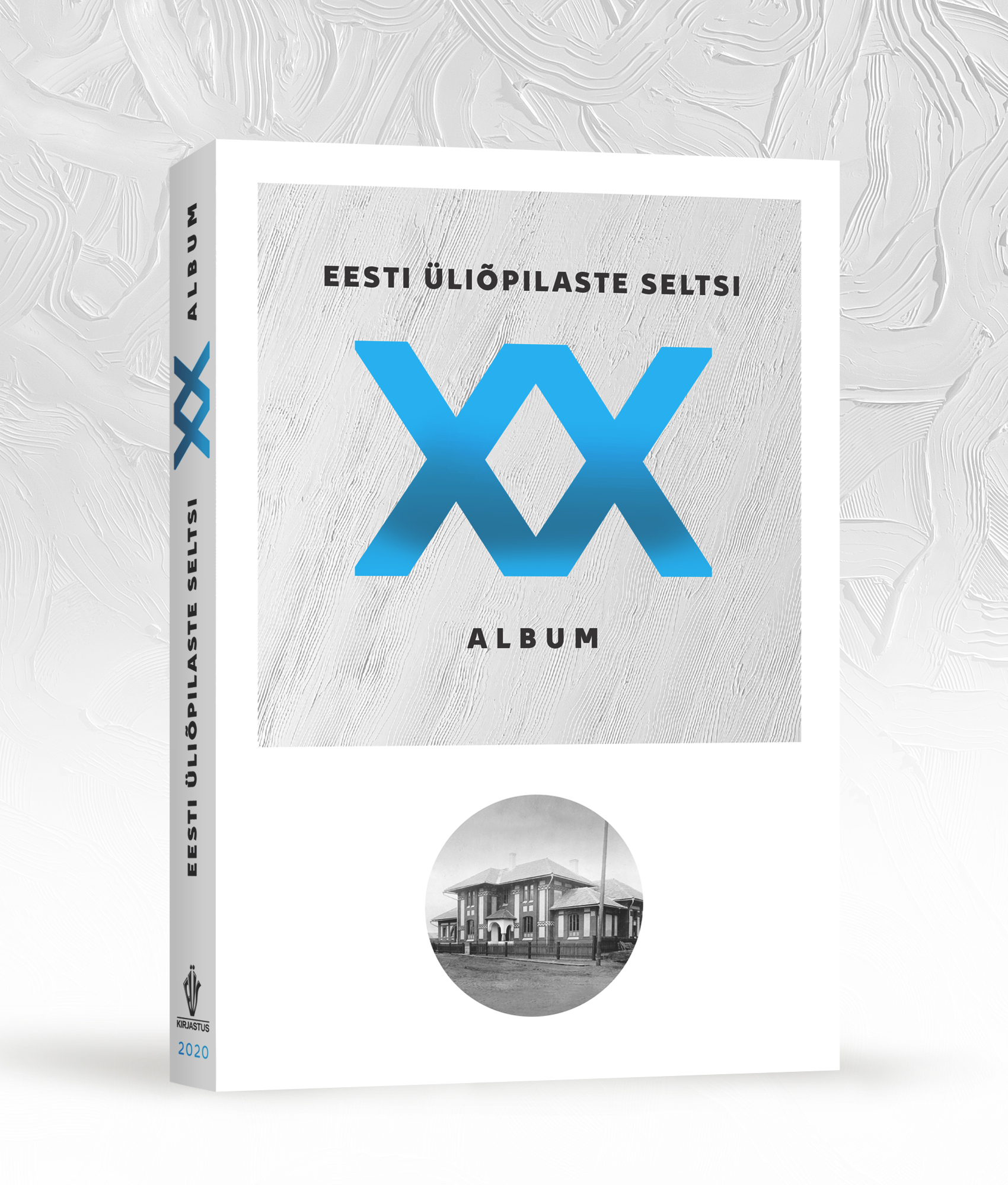 Eesti Üliõpilaste Seltsi XX album